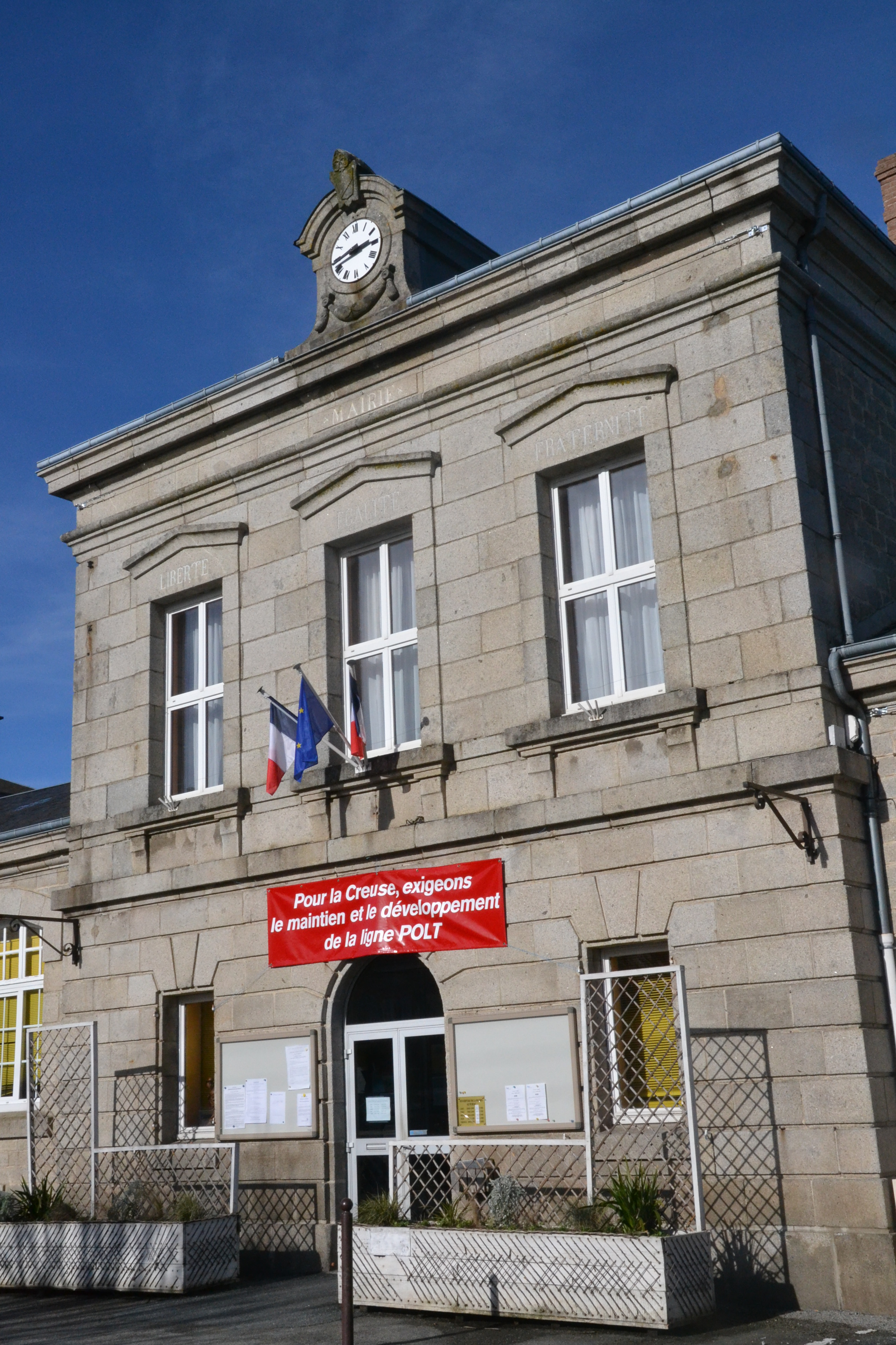 La façade de la mairie de Sainte-Feyre (Creuse, France), et une banderole anti-LGV Poitiers-Limoges et pro-POLT.